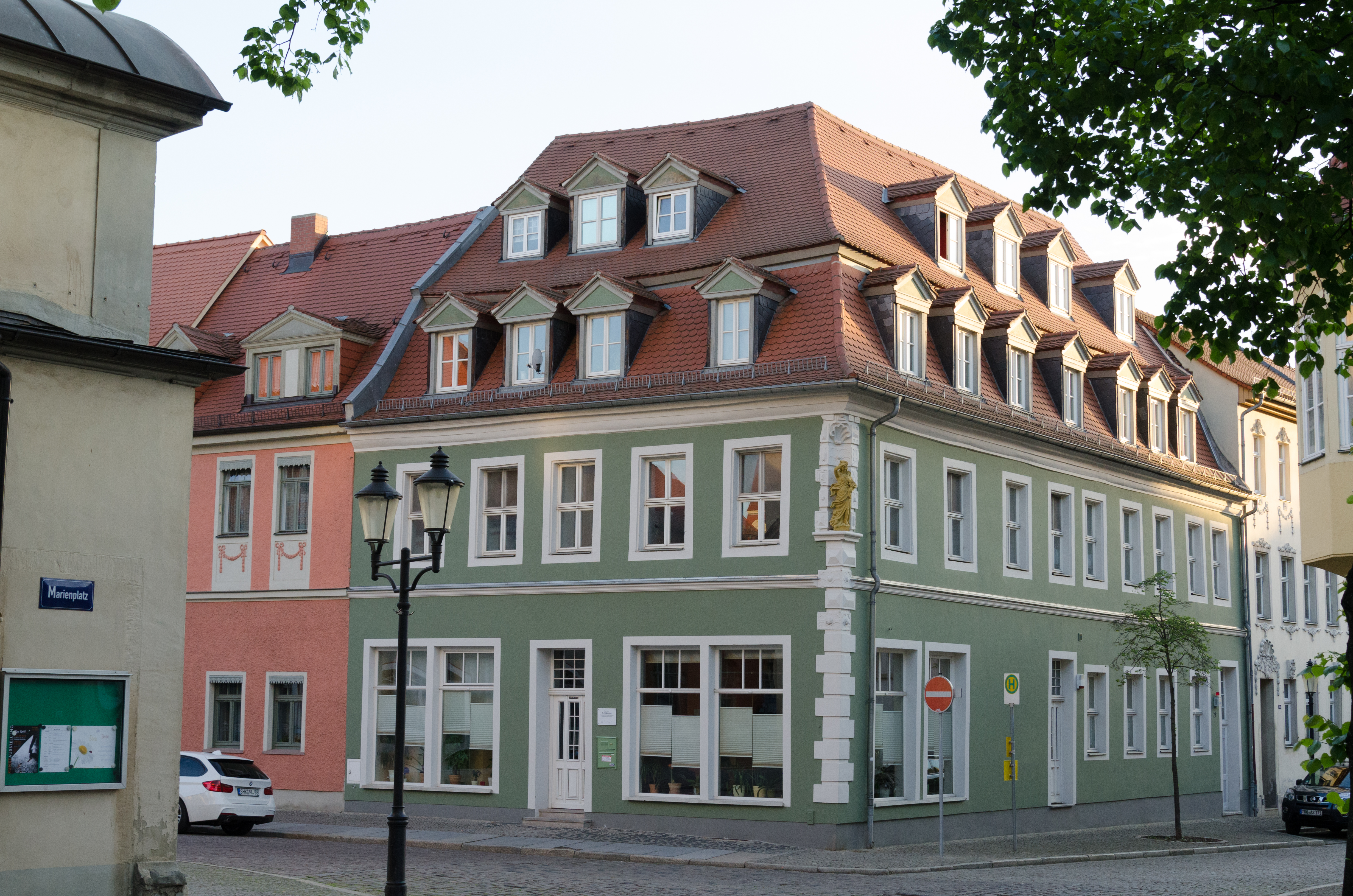 Naumburg, Fischstraße 29